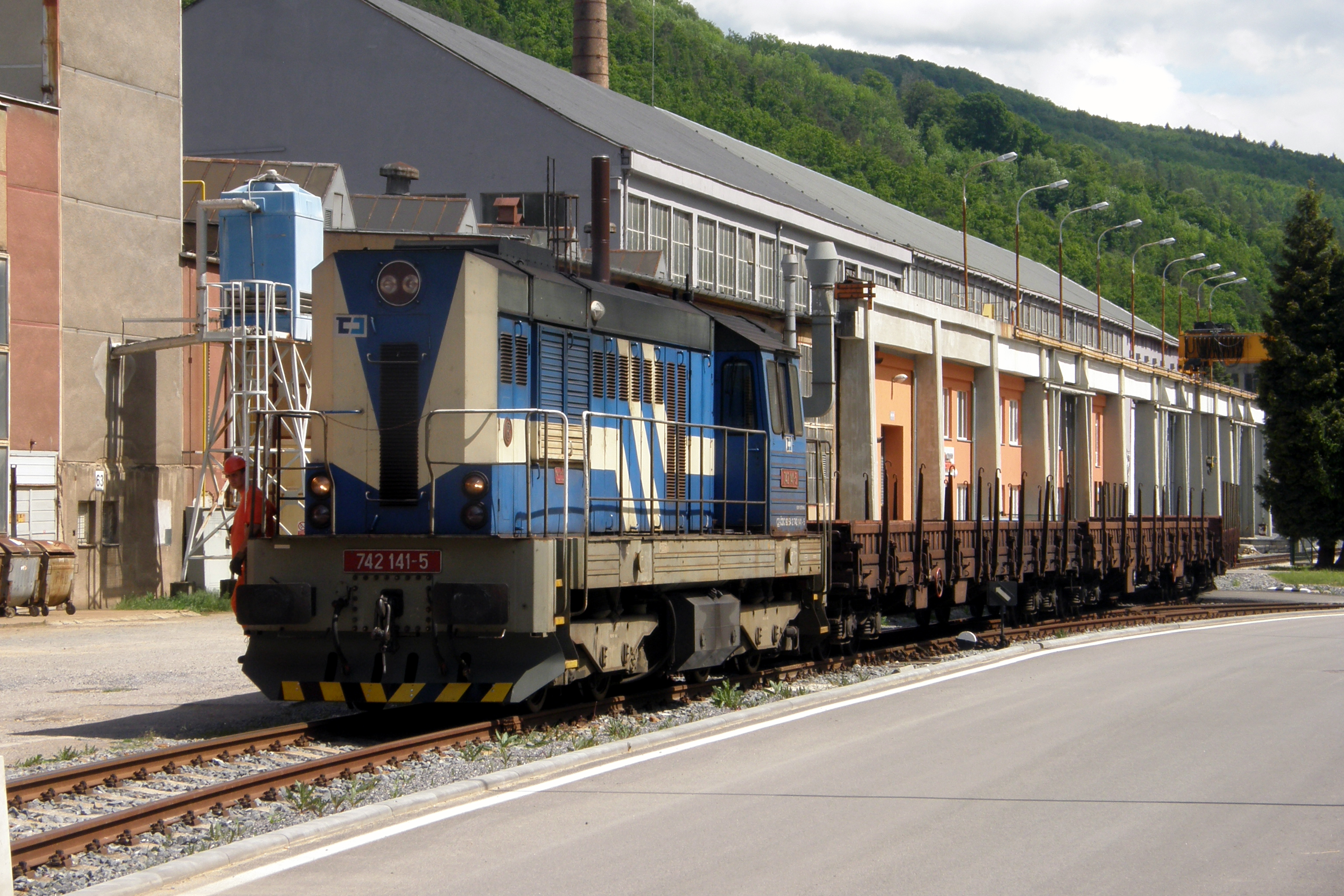 Lokomotiva 742 141-5 v Adamově na vlečce.